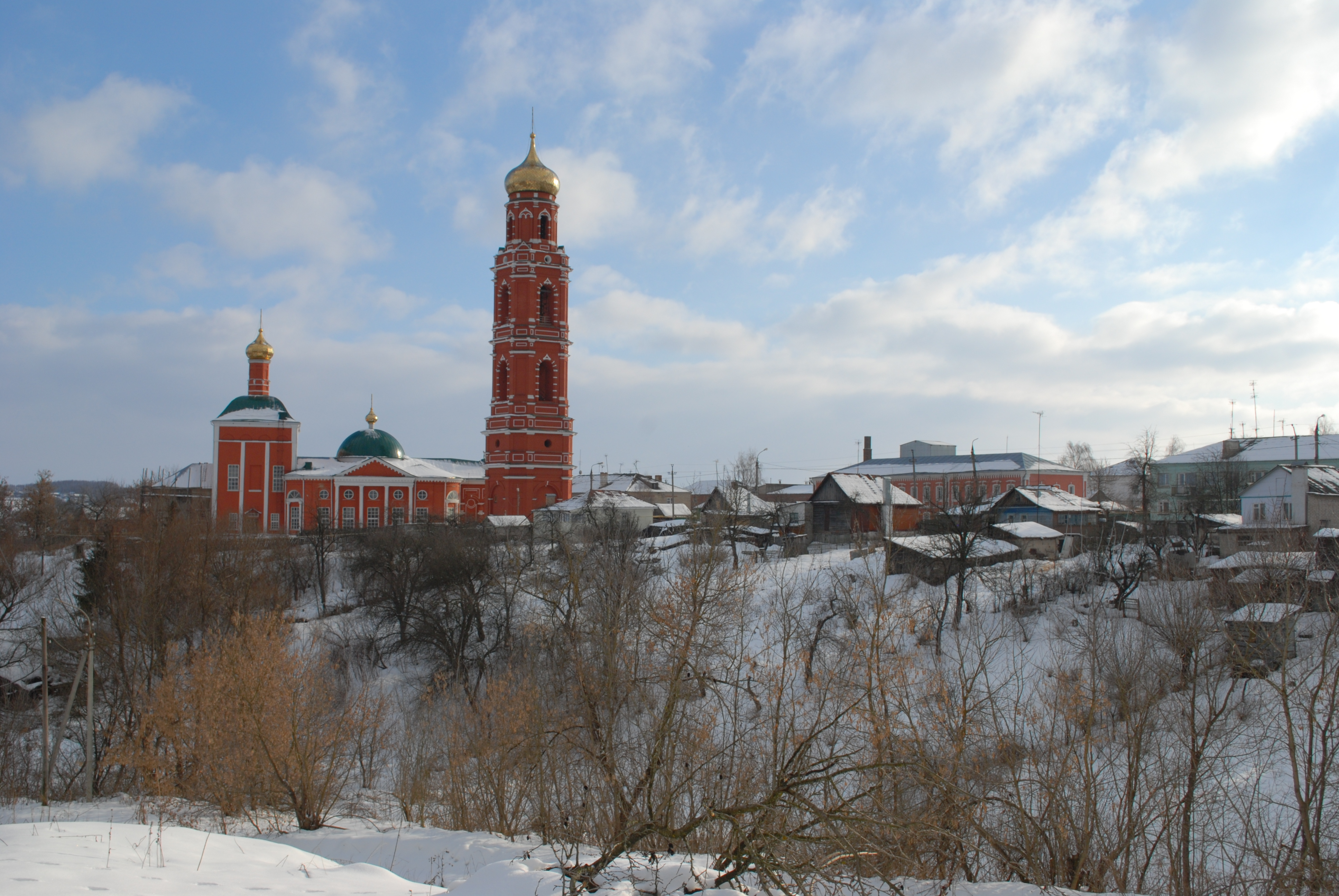 Георгиевская церковь (Орловская область, Болхов, улица Свердлова, 108, 110)